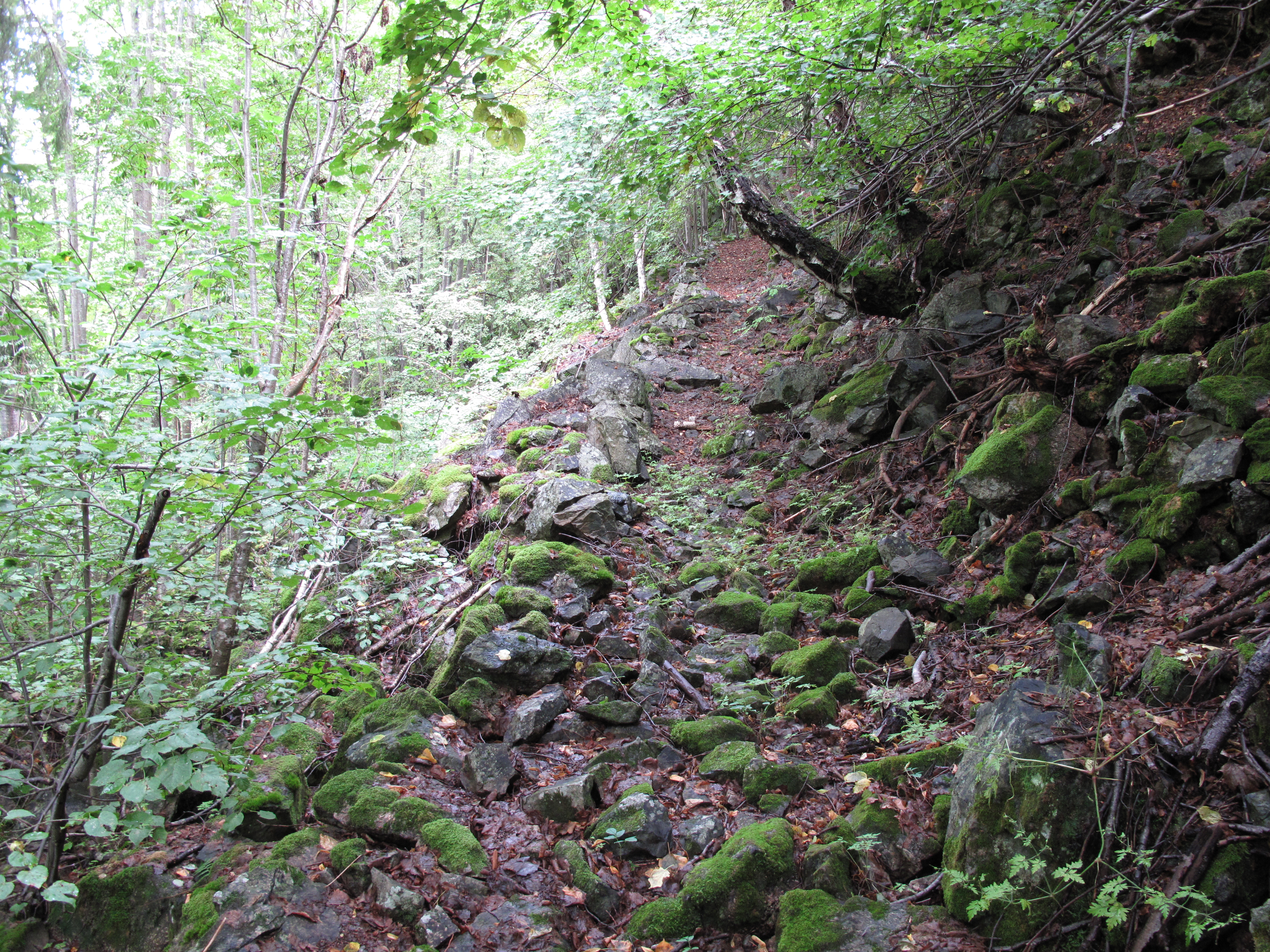 Oppmuret gammel hestevei i Enli naturreservat